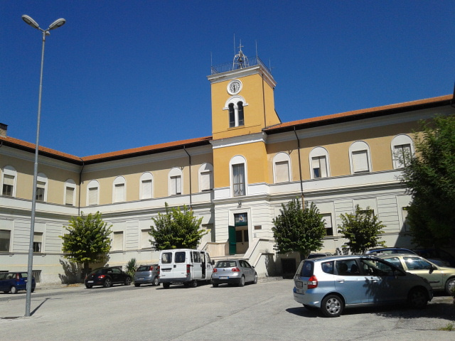 Piazzale interno e facciata dell'ex seminario